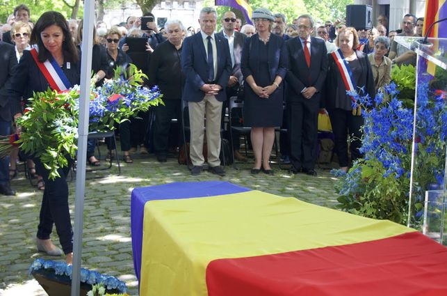 La alcaldesa de París deposita unas flores a los pies del ataúd de Francesc Boix